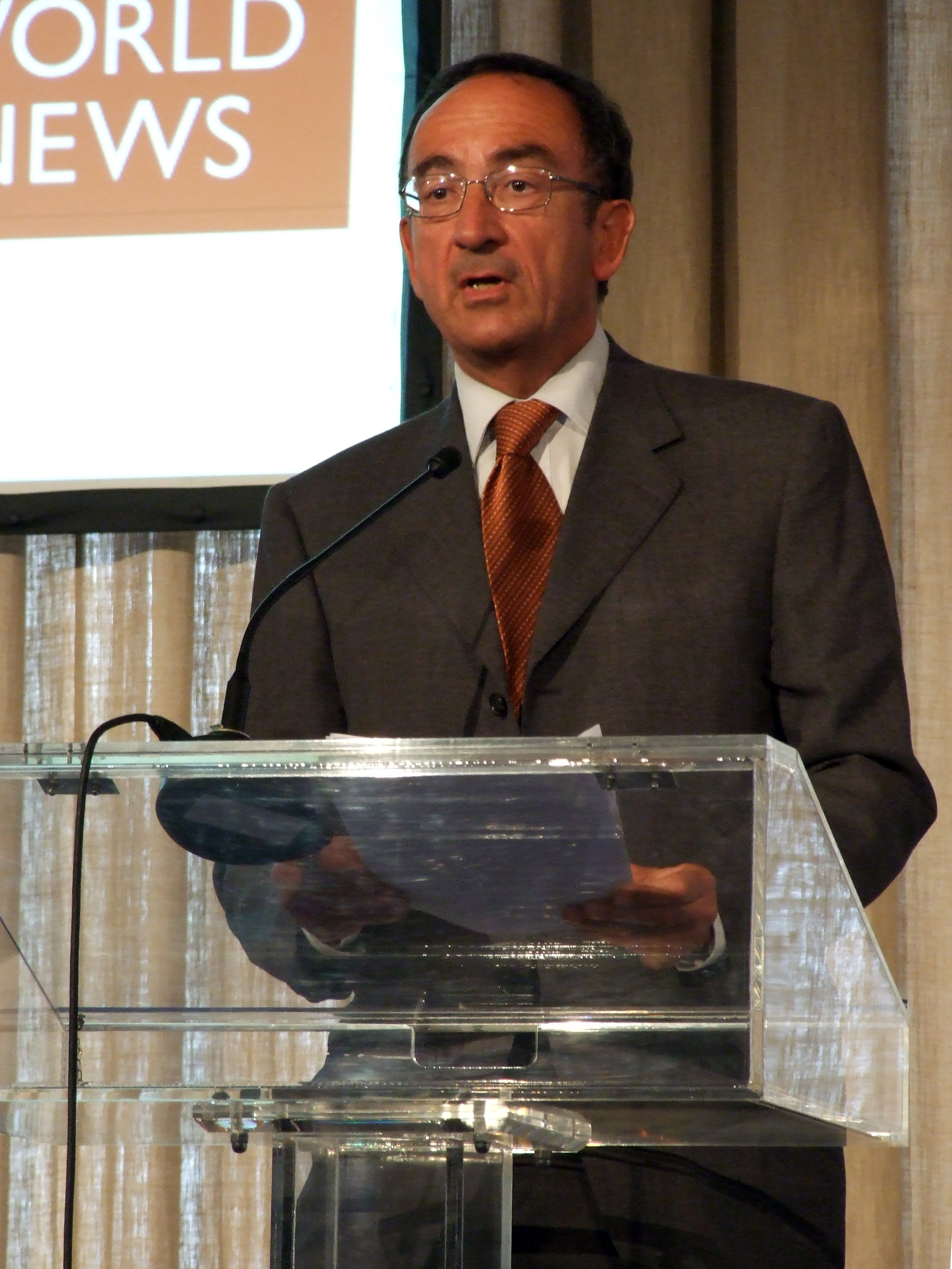 Philippe Cayla bei der Laudatio zur Karlsmedaille für europäische Medien 2009. Er ist Präsident von Euronews